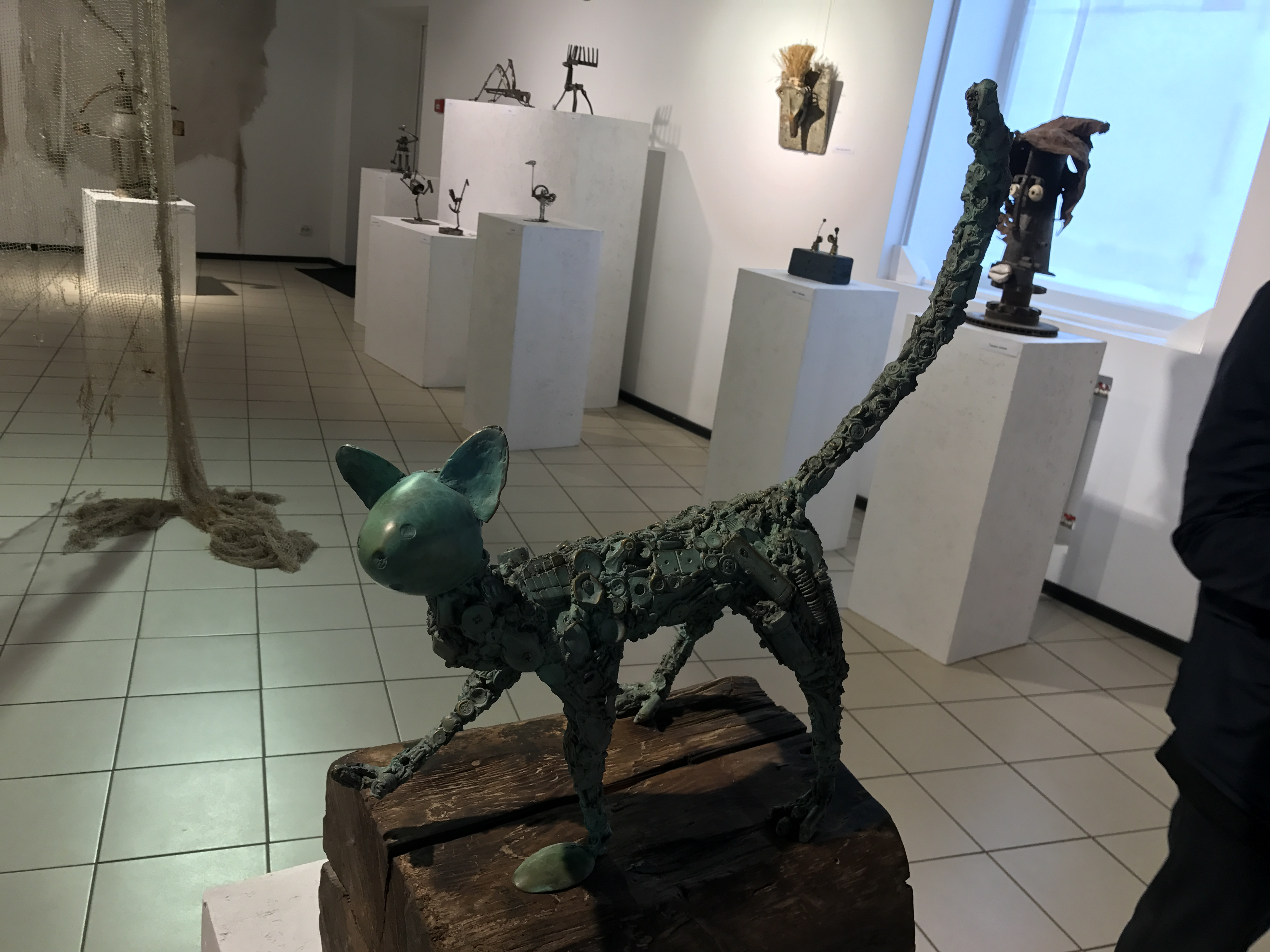 Выставка Андрея Сикорского. 2017 г.